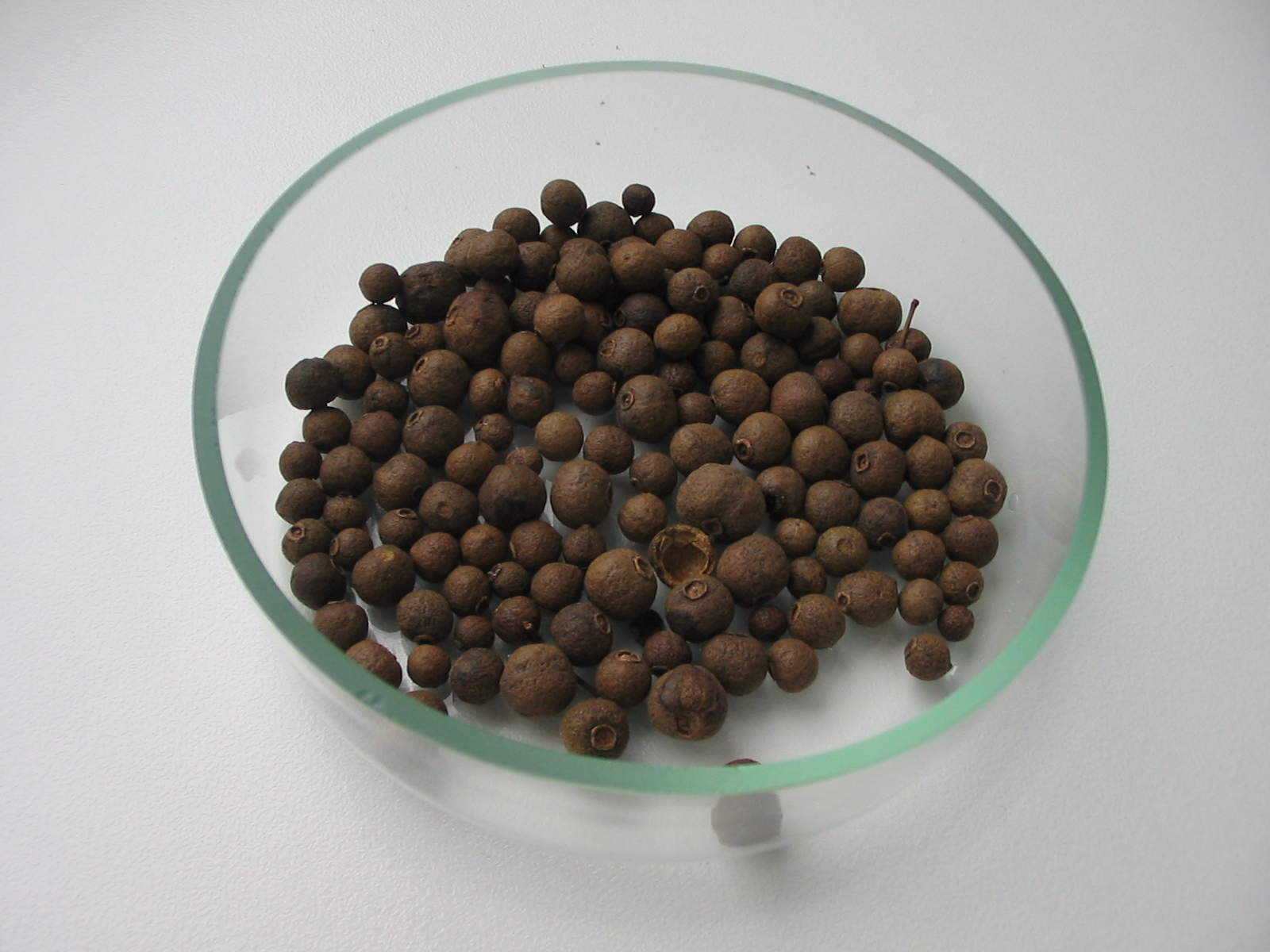 насіння англійського (духм'яного) перцю